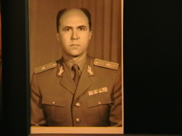 General Emil Andriescu